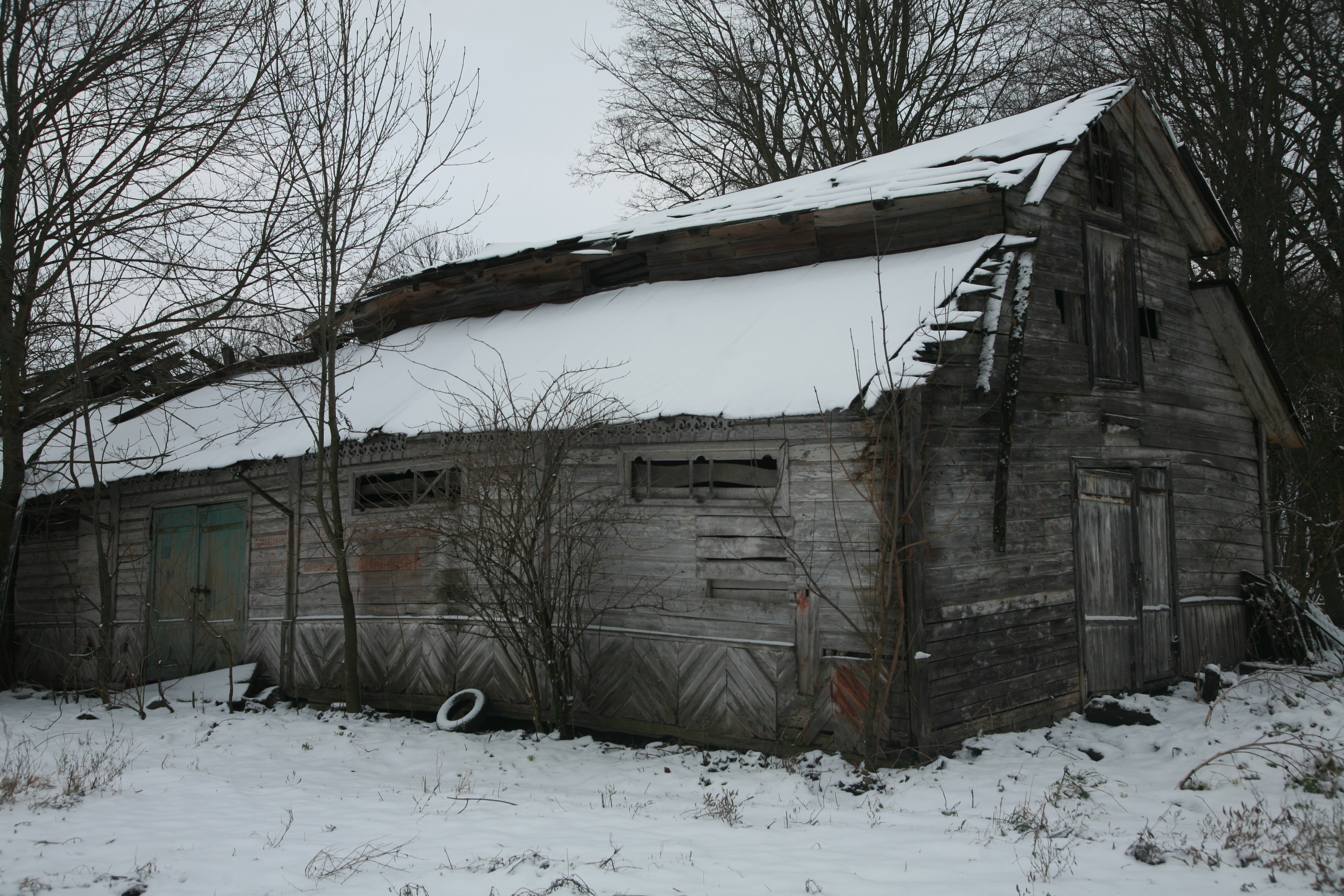 Залишки каретного двору в Покорщині